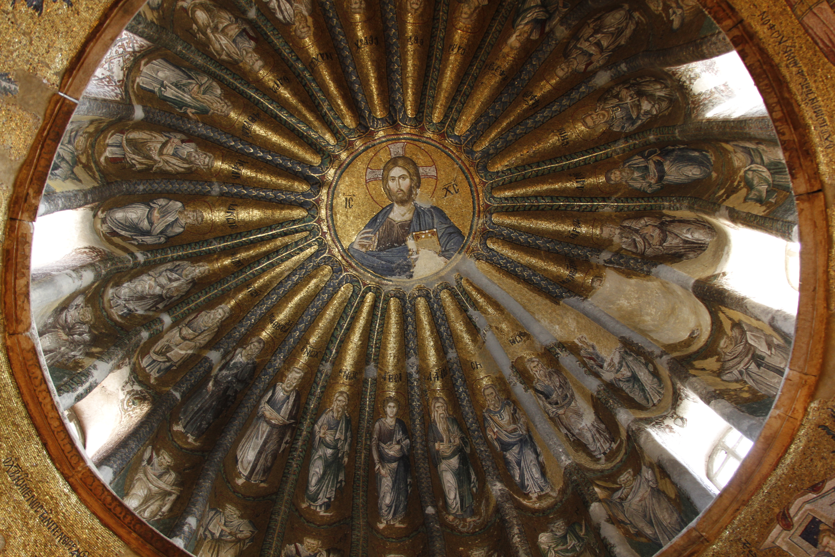 Mosaico sobre a genealogia de Jesus em Chora.